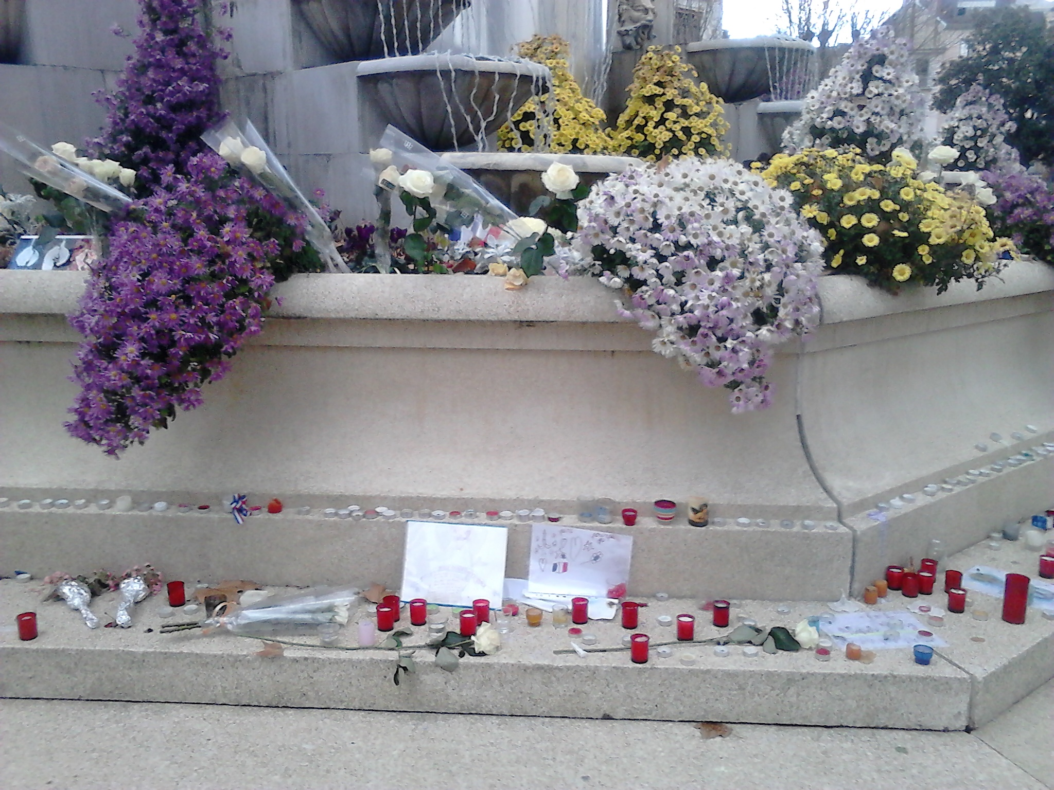 Fontaine de la place Maurice Mollard d'Aix-les-Bains après les attentats de novembre 2015 à Paris.